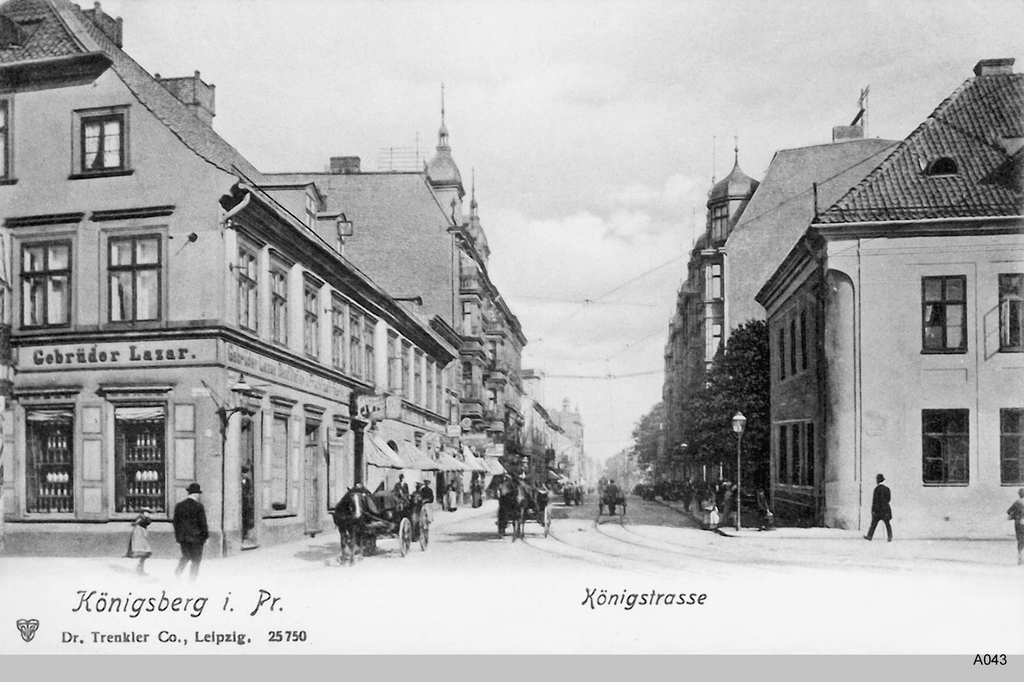 Königsberg